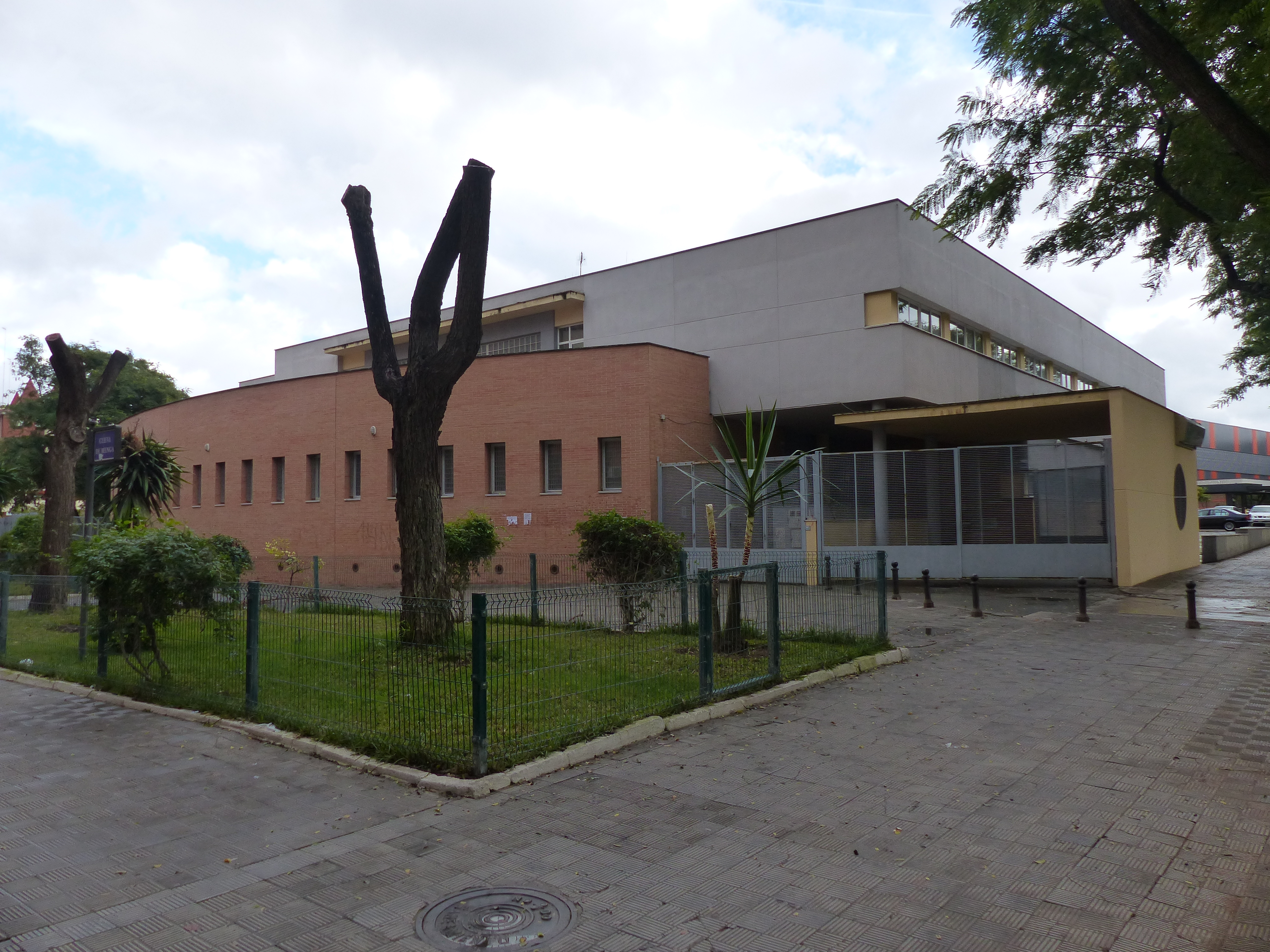 Centro de Salud Puerta Este Dr. Pedro Vallina